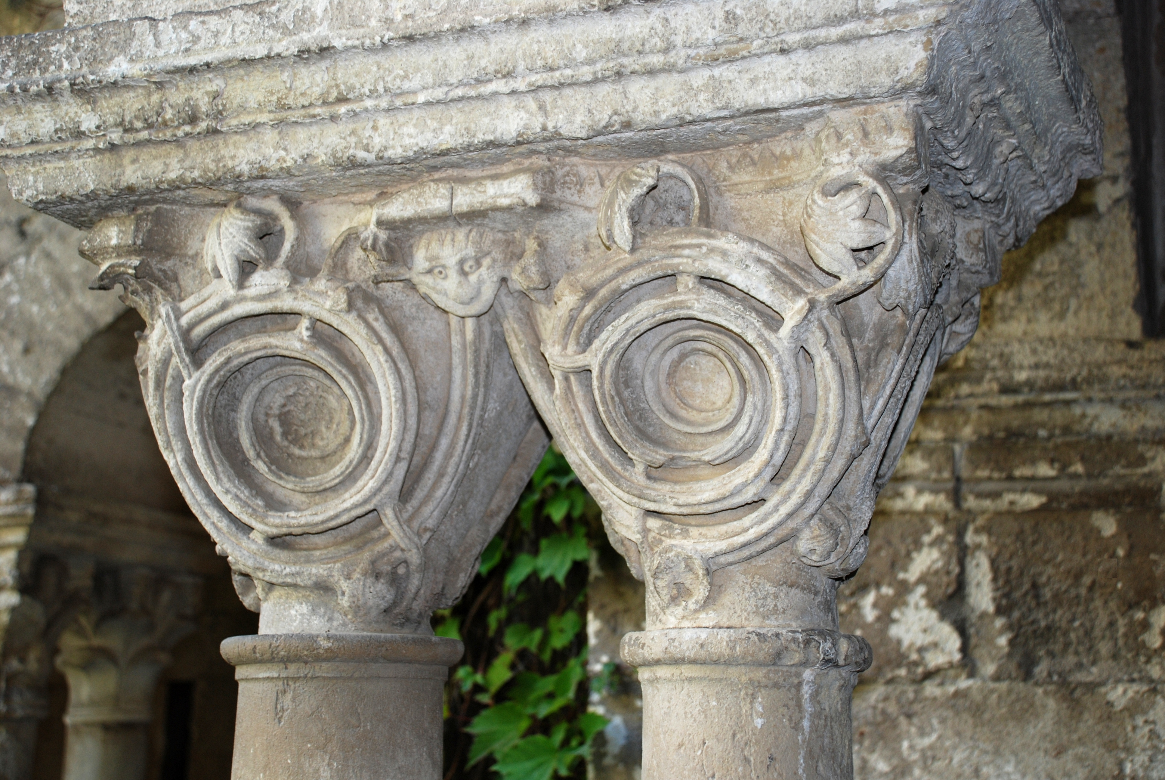 France - Provence - Bouches-du-Rhône - Monastère Saint-Paul-de-Mausole